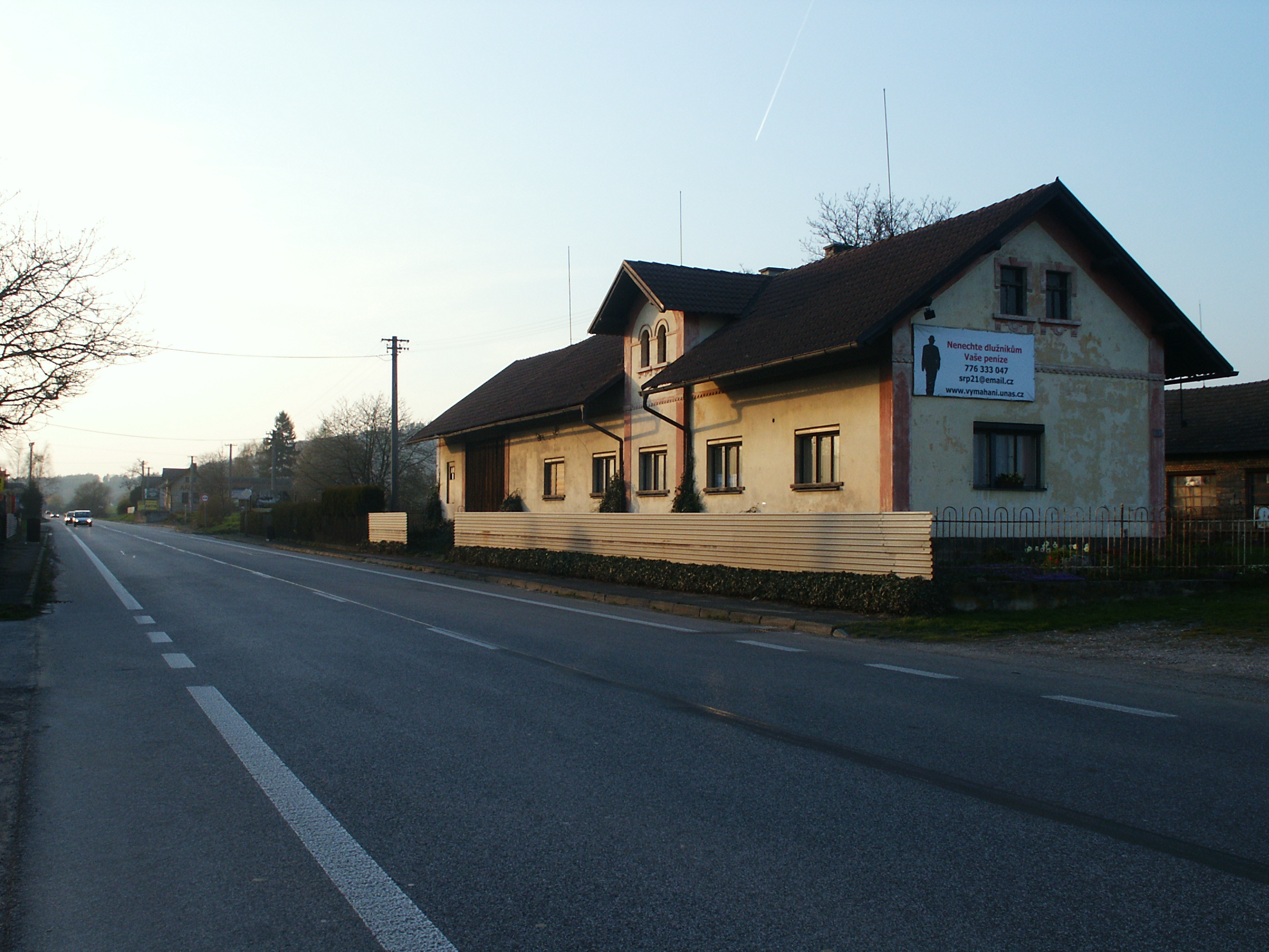 Ohaveč - silnice I16 na východním kraji obce, č.p.23